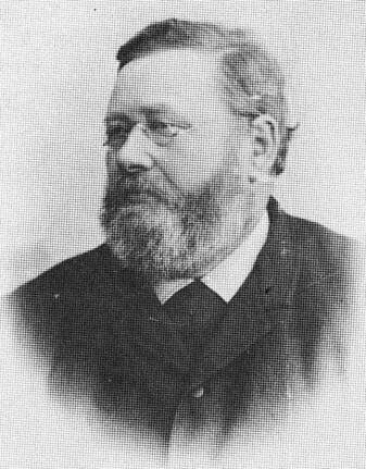 Andreas Christian Bech Jürgensen (1840–1895), Mosjøens ordfører.